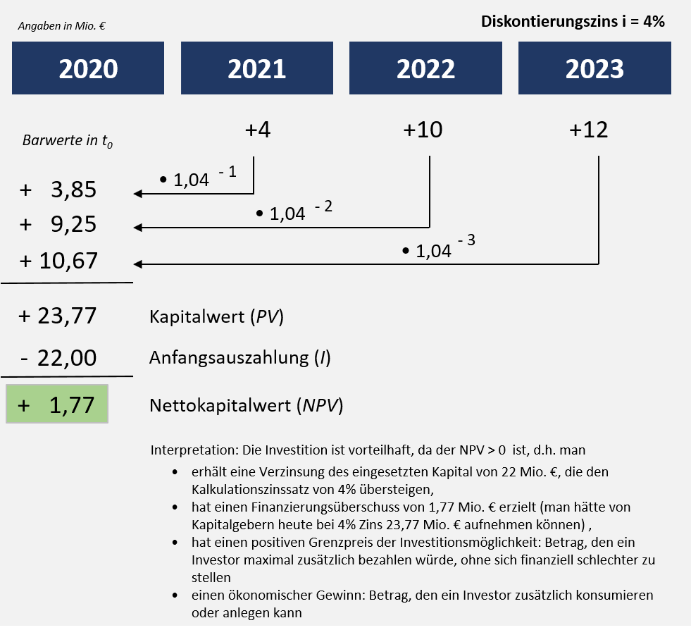 Berechnung des NPV